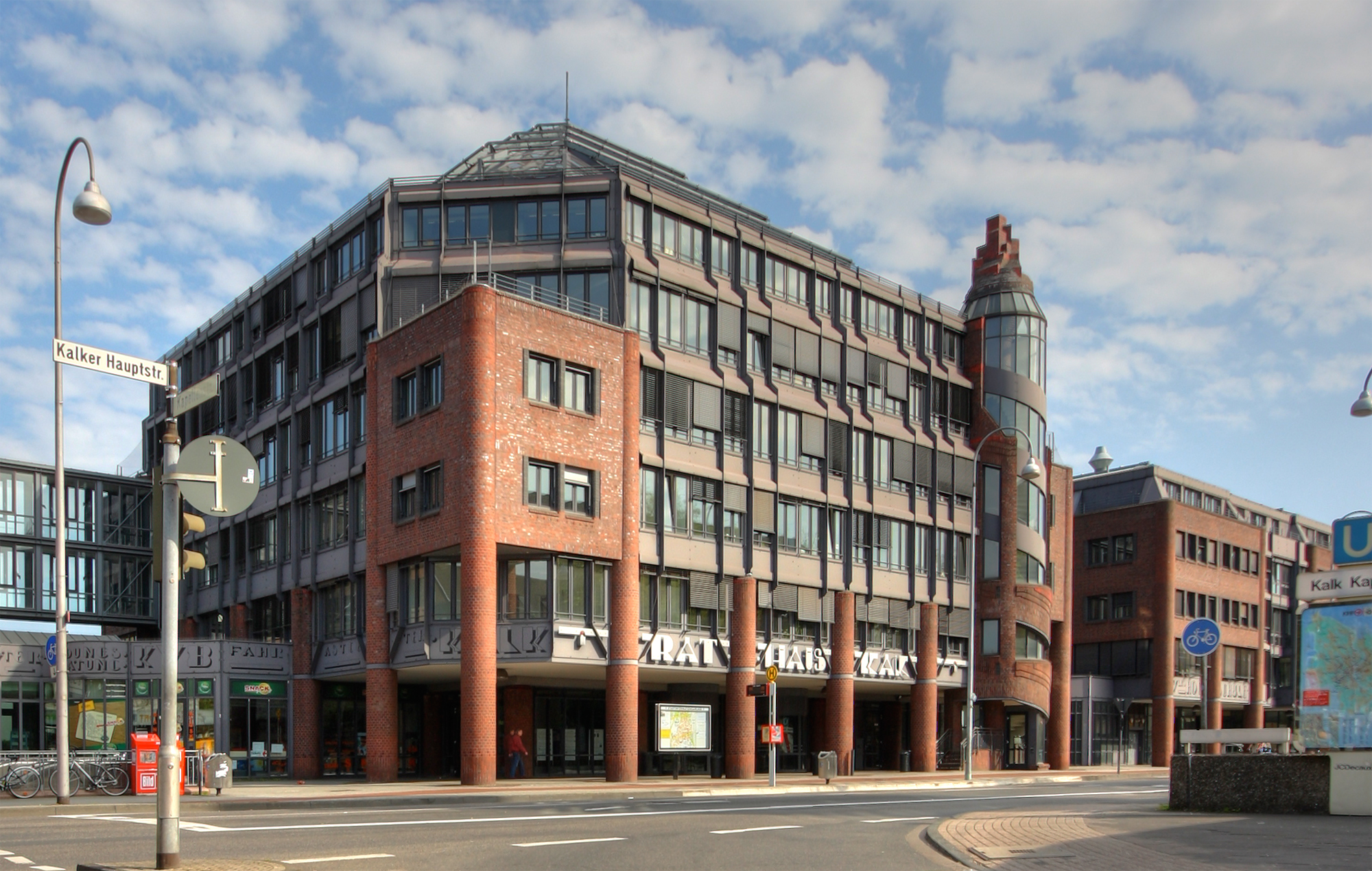 Rathaus Köln-Kalk, Architekt: Gottfried Böhm